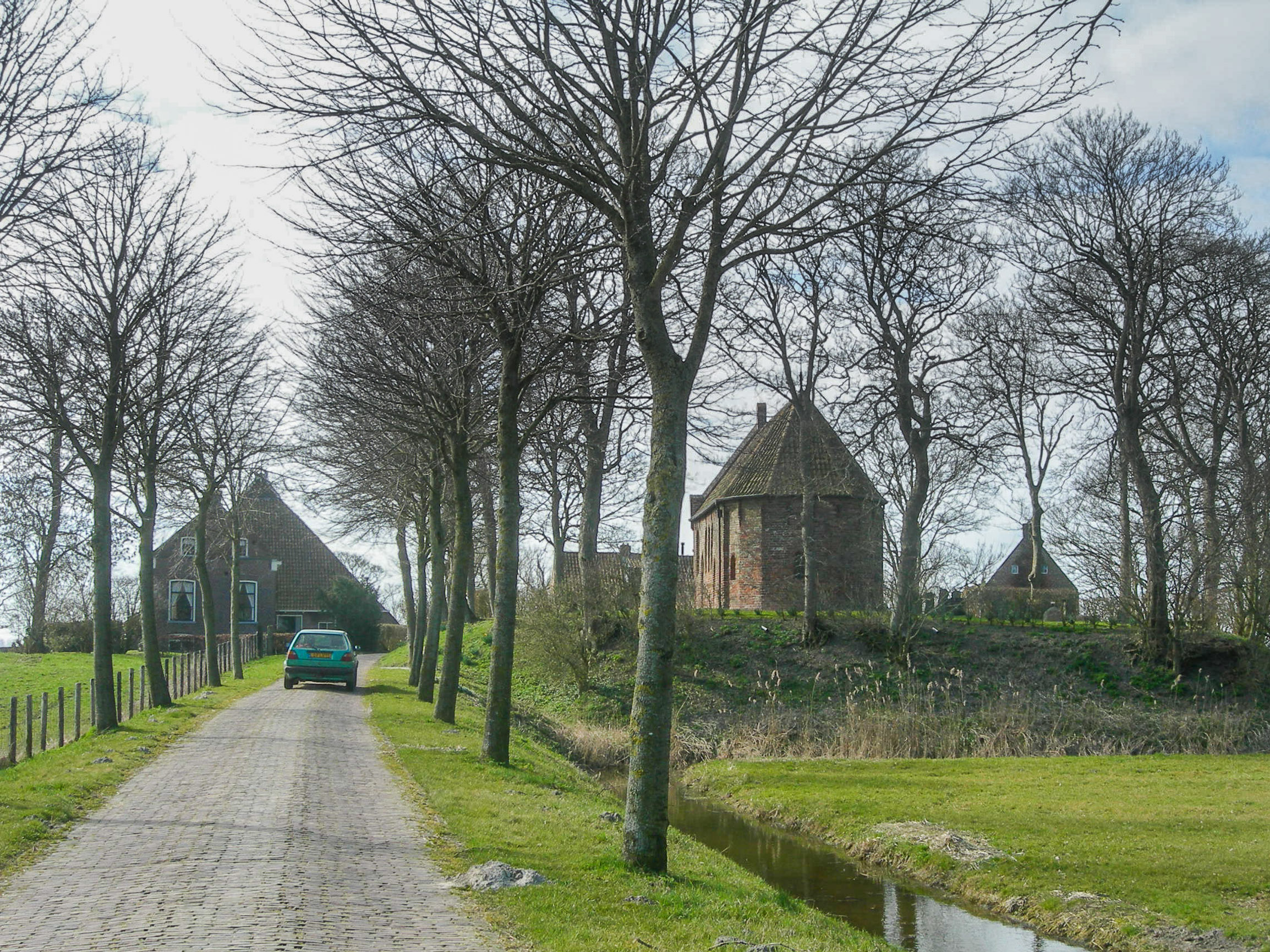 De Terp met kerkje en huisjes. Janum.